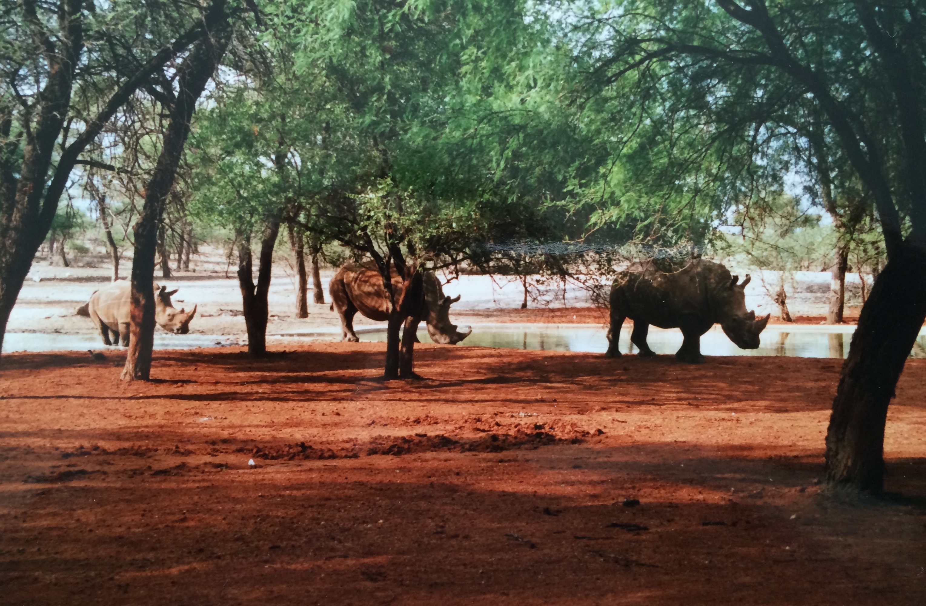 Omararu Game Lodge